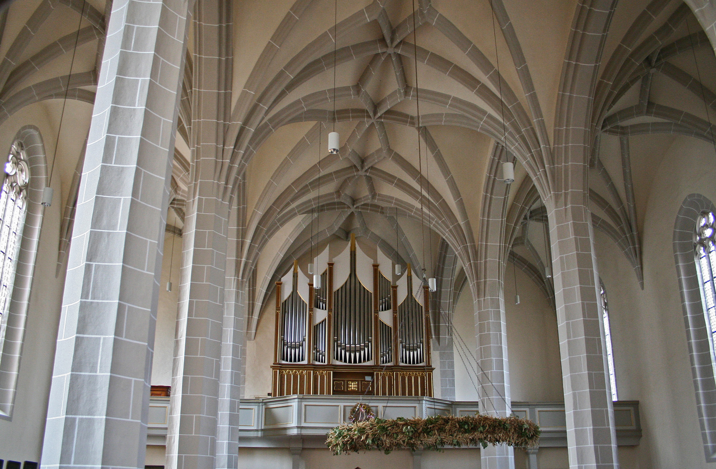 Leisnig, Kirche St. Matthäi, Blick nach Westen